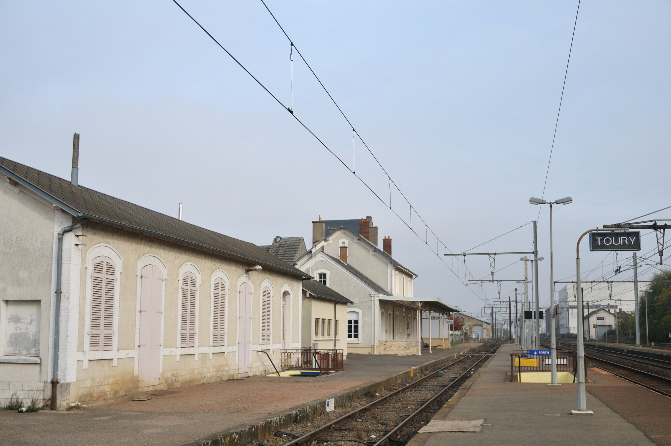 Gare de Toury, Eure-et-Loir, France